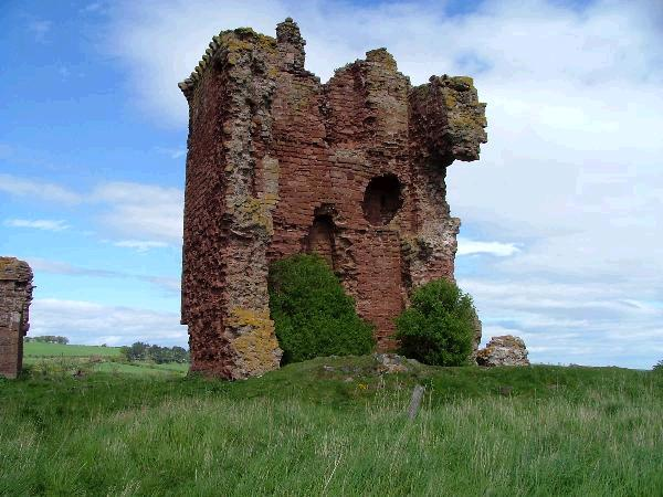 Redcastle, near Lunan, Angus